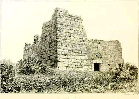 המצודה בספוריה היא ציפורי כפי שצוירה על ידי קלוד קונדר במסגרת הסקר שבוצע על ידי הקרן לחקר ארץ ישראל